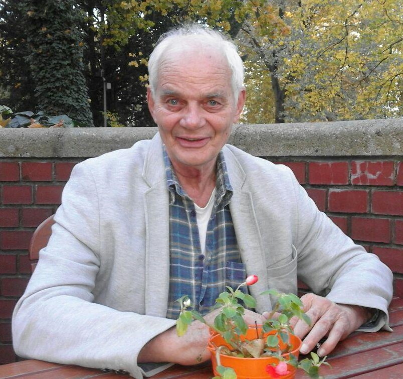 Aktuelles Profilbild von Tom Hockemeyer im Jahre 2018.